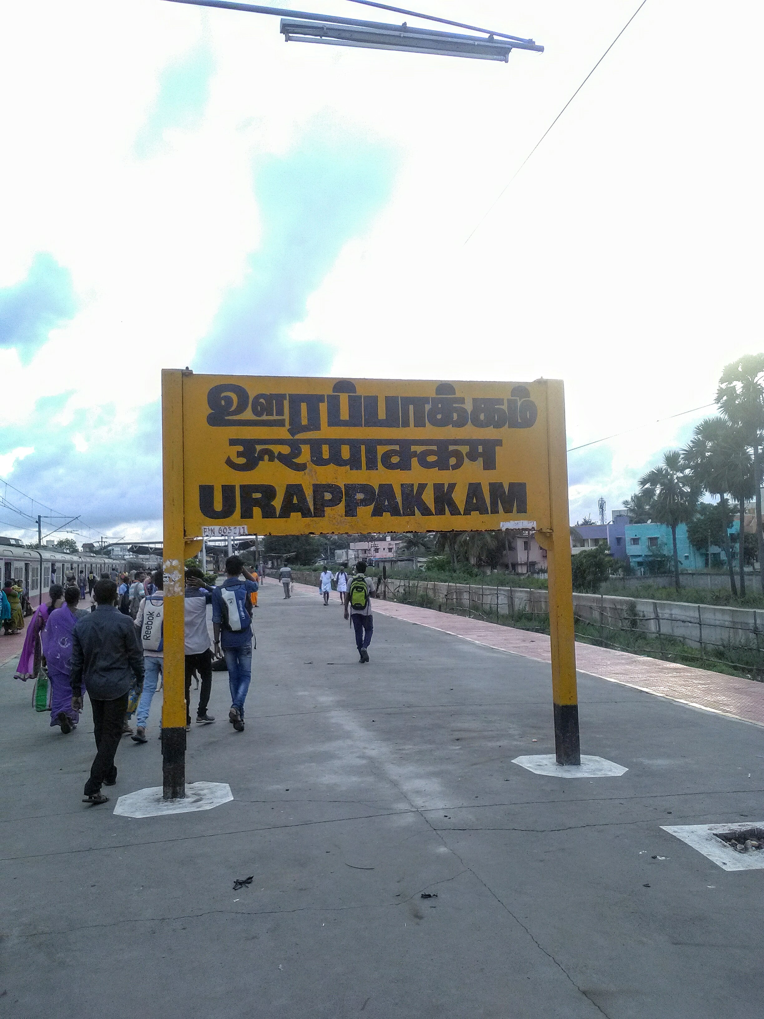 ஊரப்பாக்கம் இரயில் நிலையத்தில் எடுக்கப்பட்ட புகைப்படம் ..